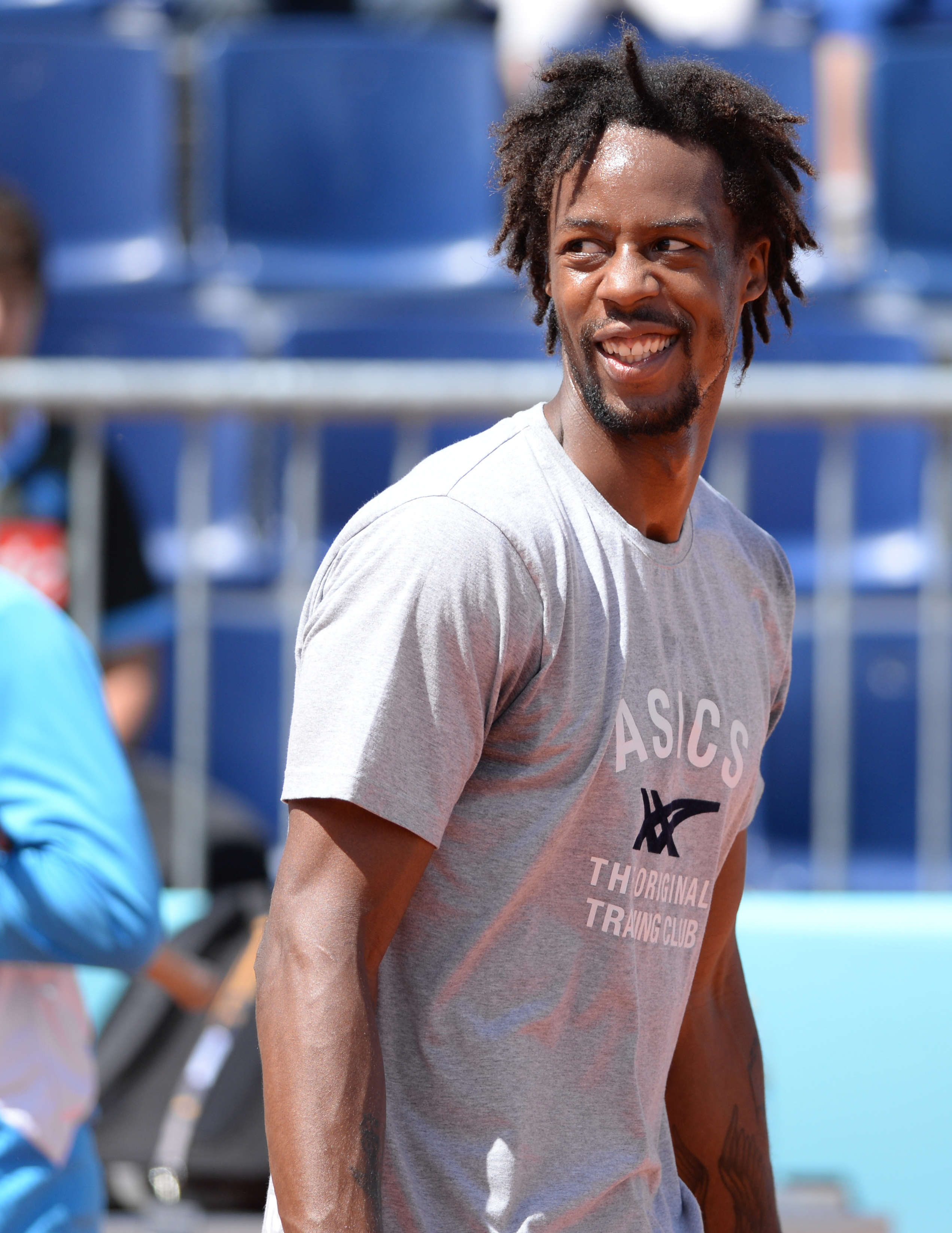 Gael Monfils